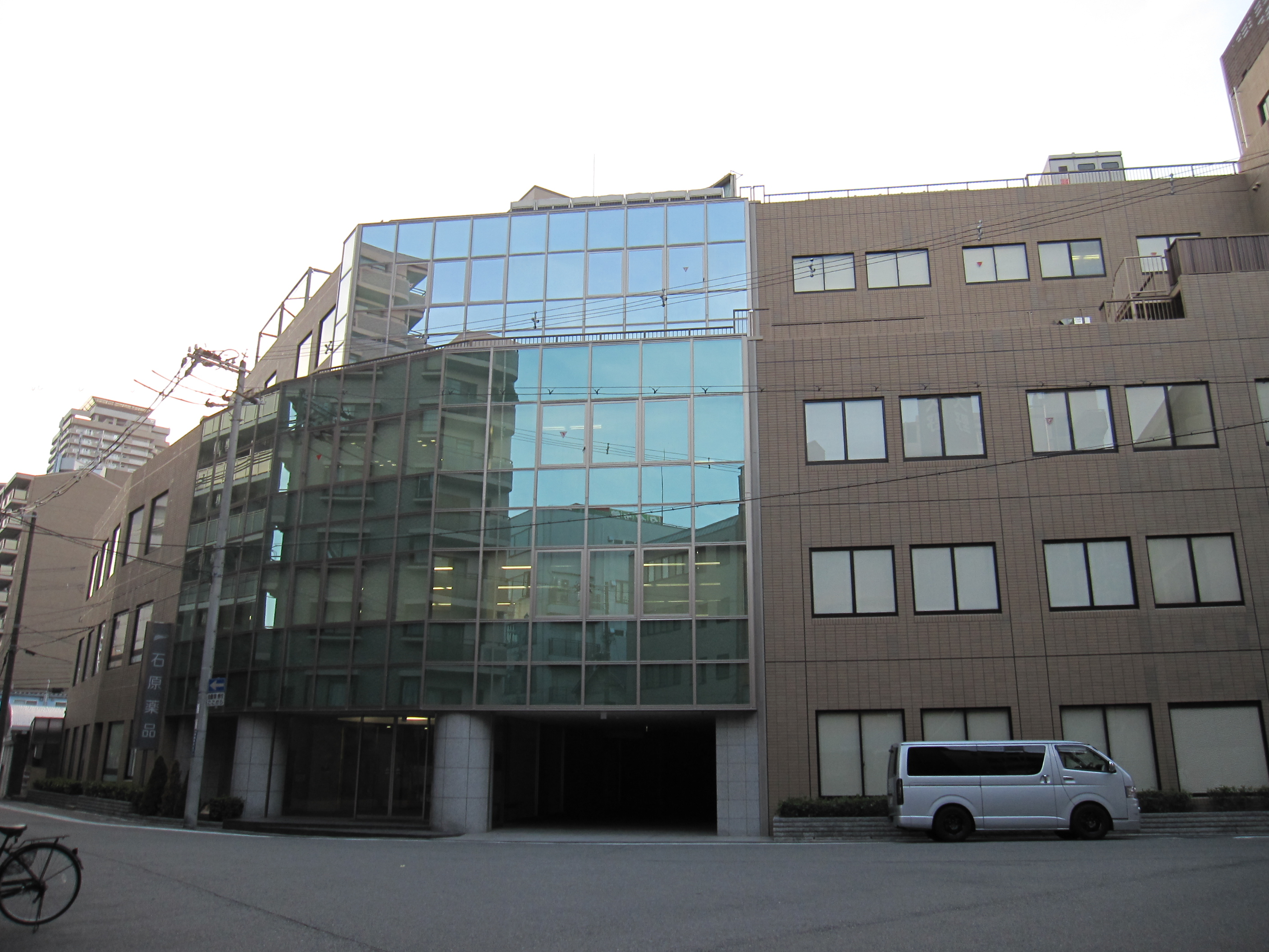 石原薬品本社